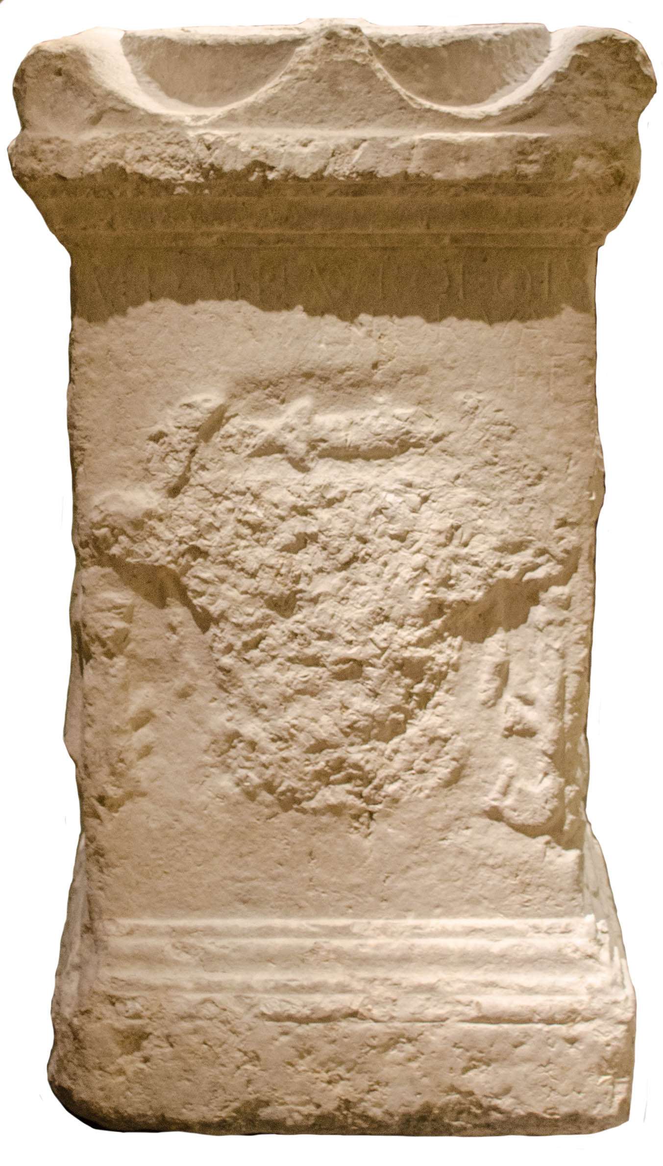 Autel taurobolique des dendrophores, CIL XII, 1744, face principale : tête de taureau. Musée des beaux-arts et d’archéologie de Valence, Drôme, France.